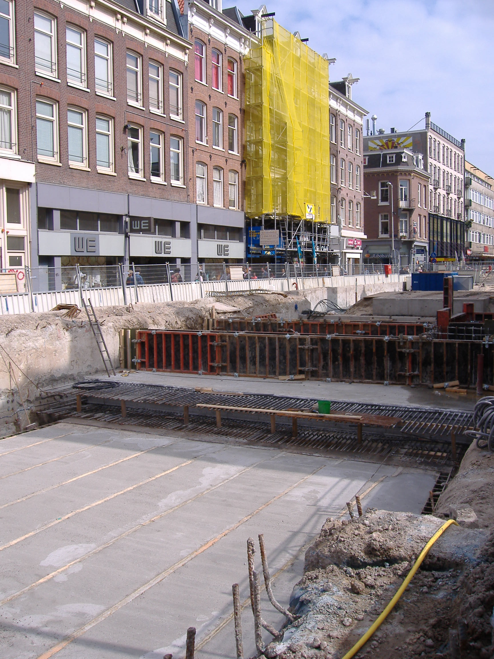 Eigen opname, 3 juni 2006